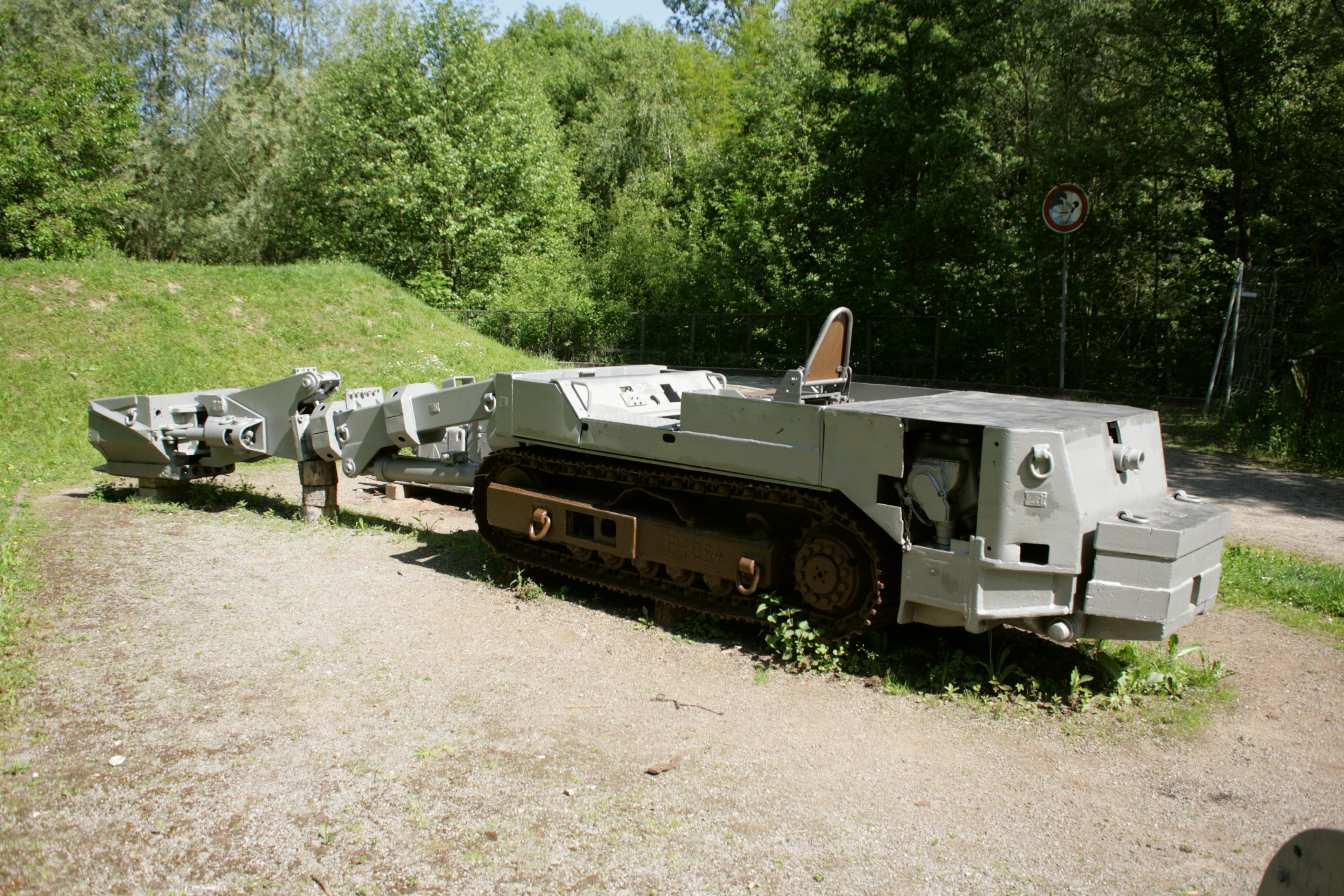 Park am Malakowturm, gegenüber Zeche Alte Haase, Hattinger Straße in Sprockhövel.